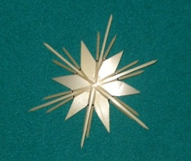 Strohstern